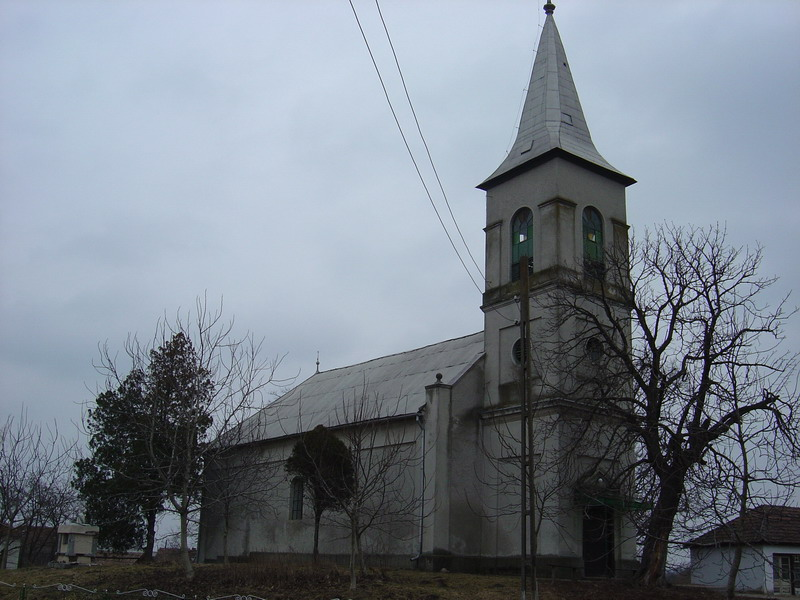 Éradonyi református templom, Erdély